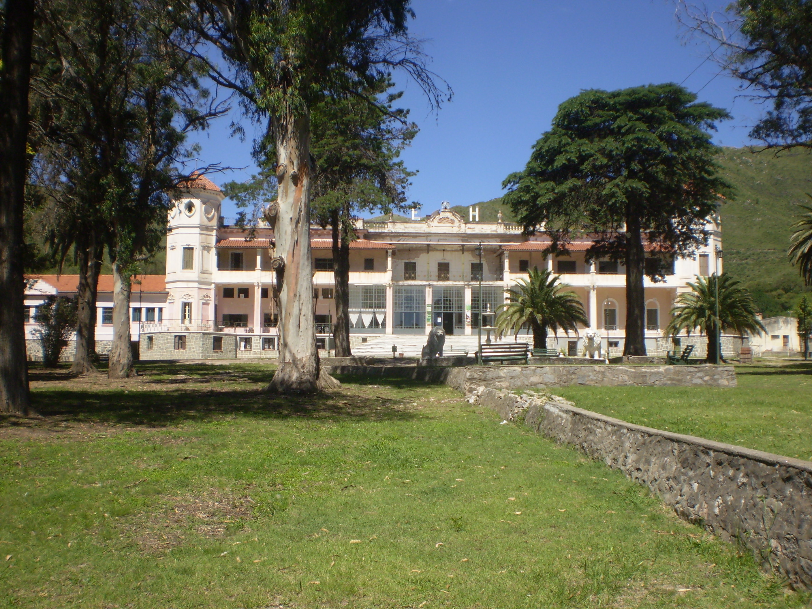 Fachada del Hotel Eden. La Falda, Cordoba. Argentina